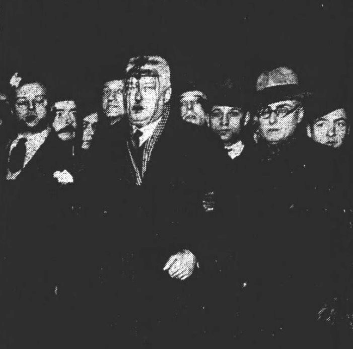 "Georges Lebecq, Président Général de l'U.N.C., cruellement blessé à la tête, est emmené par ses camarades".